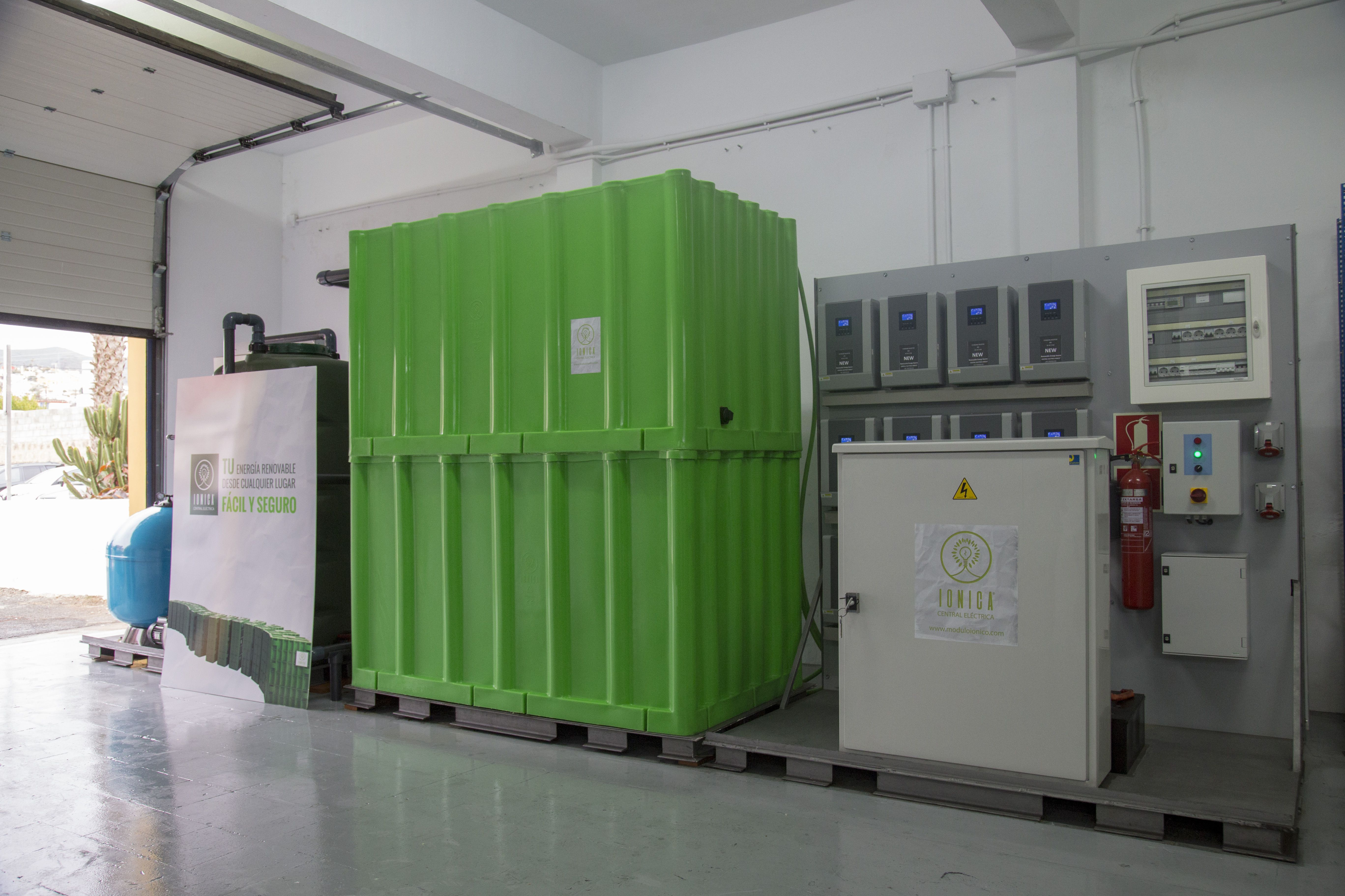 Dos módulos apilados con su cuadro de mandos